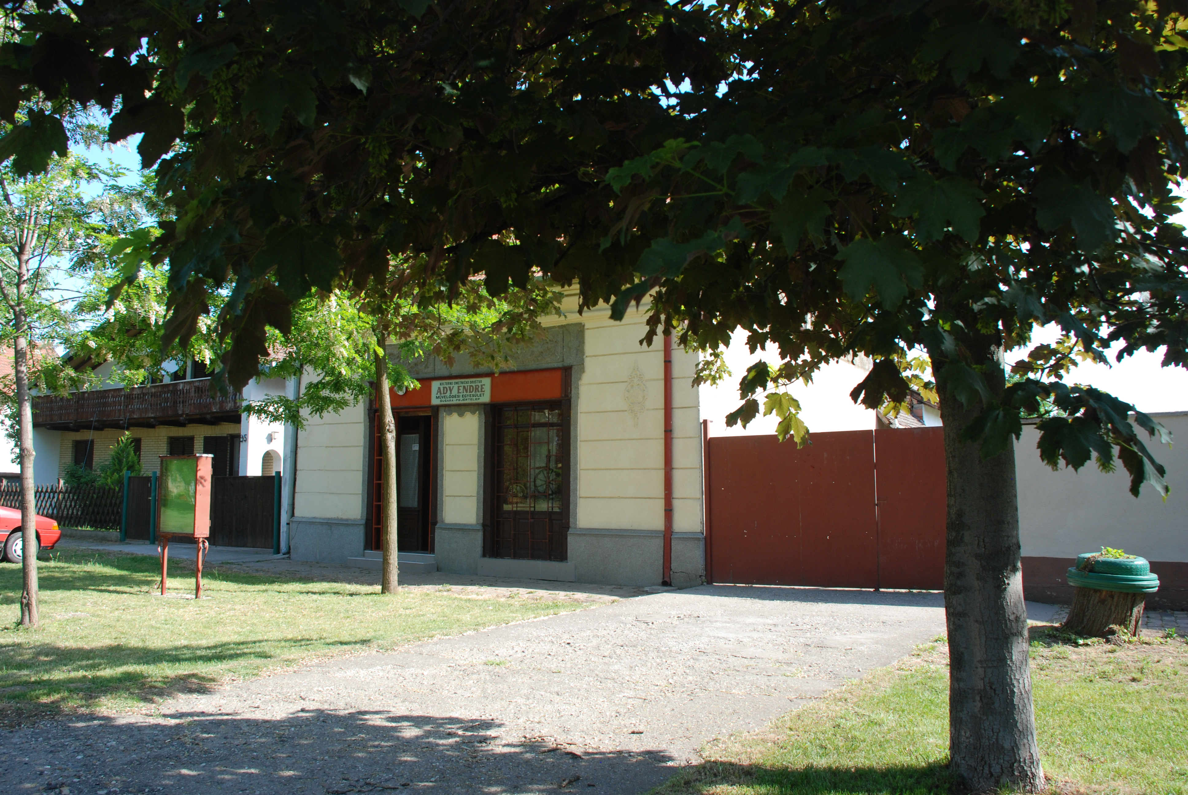 Šušara Domkulture